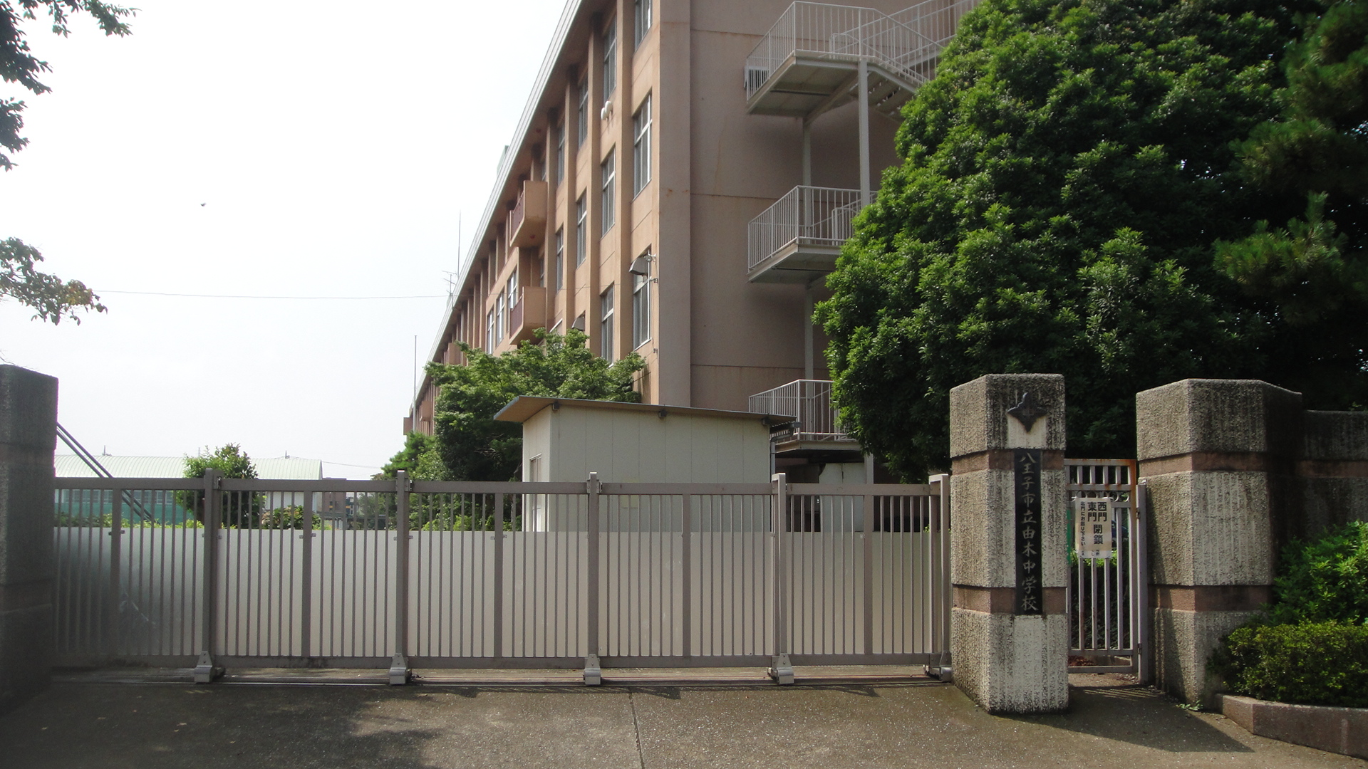 八王子市立由木中学校の東門